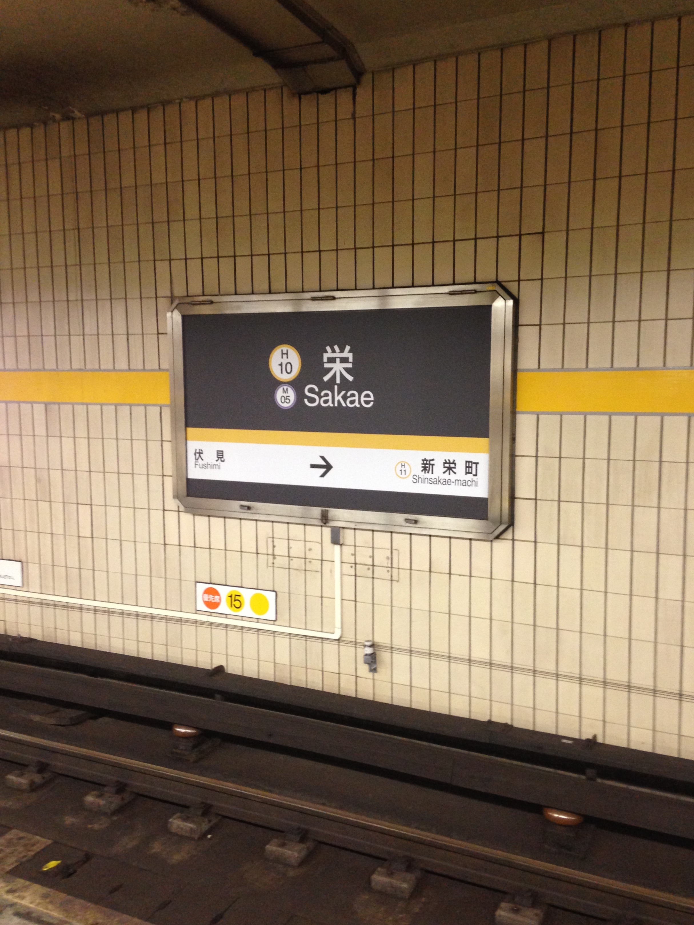 栄駅(東山線)の駅名標